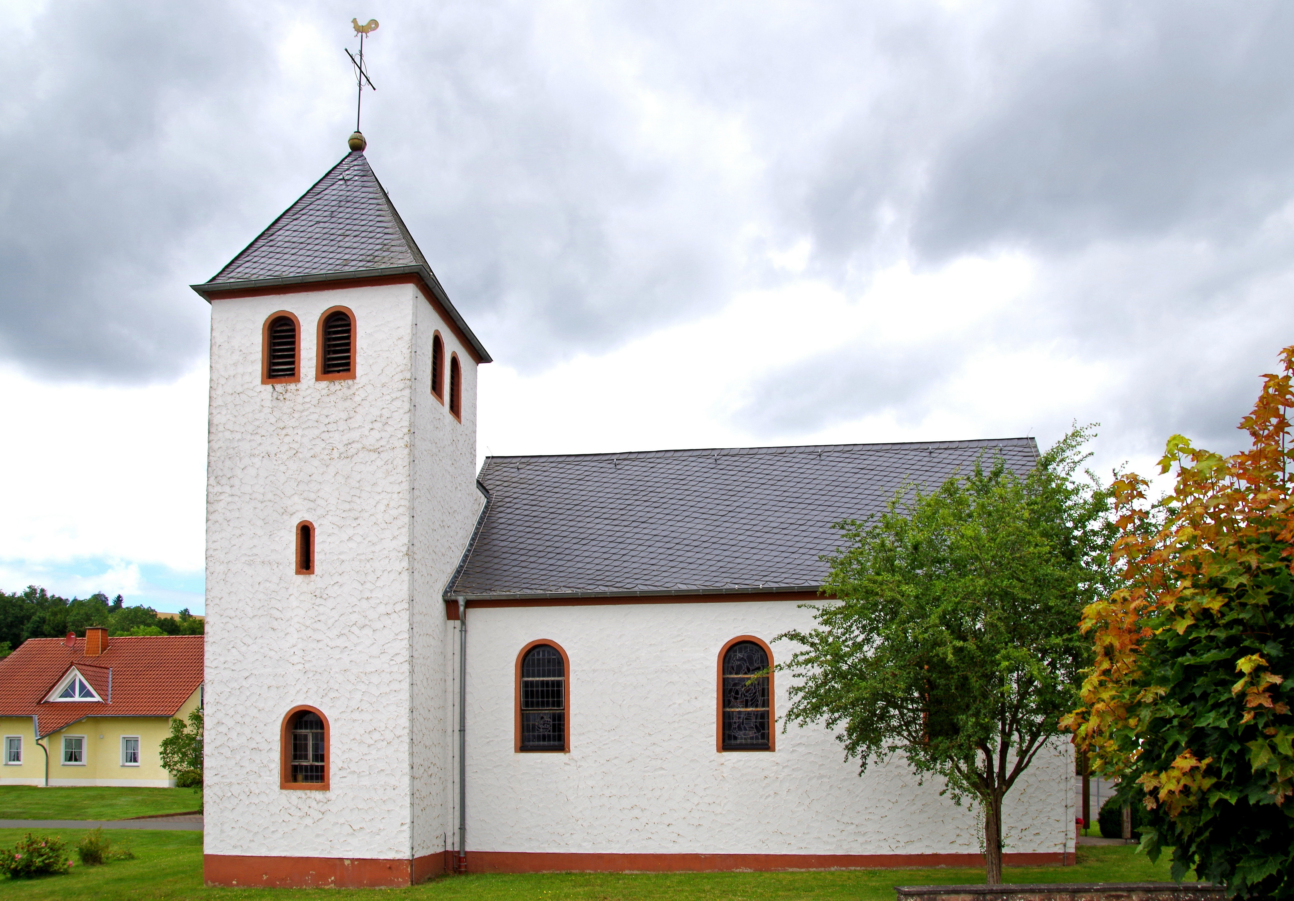 St. Lukas und Fides, Spes und Caritas (Hermesdorf (Wißmannsdorf)), Südseite